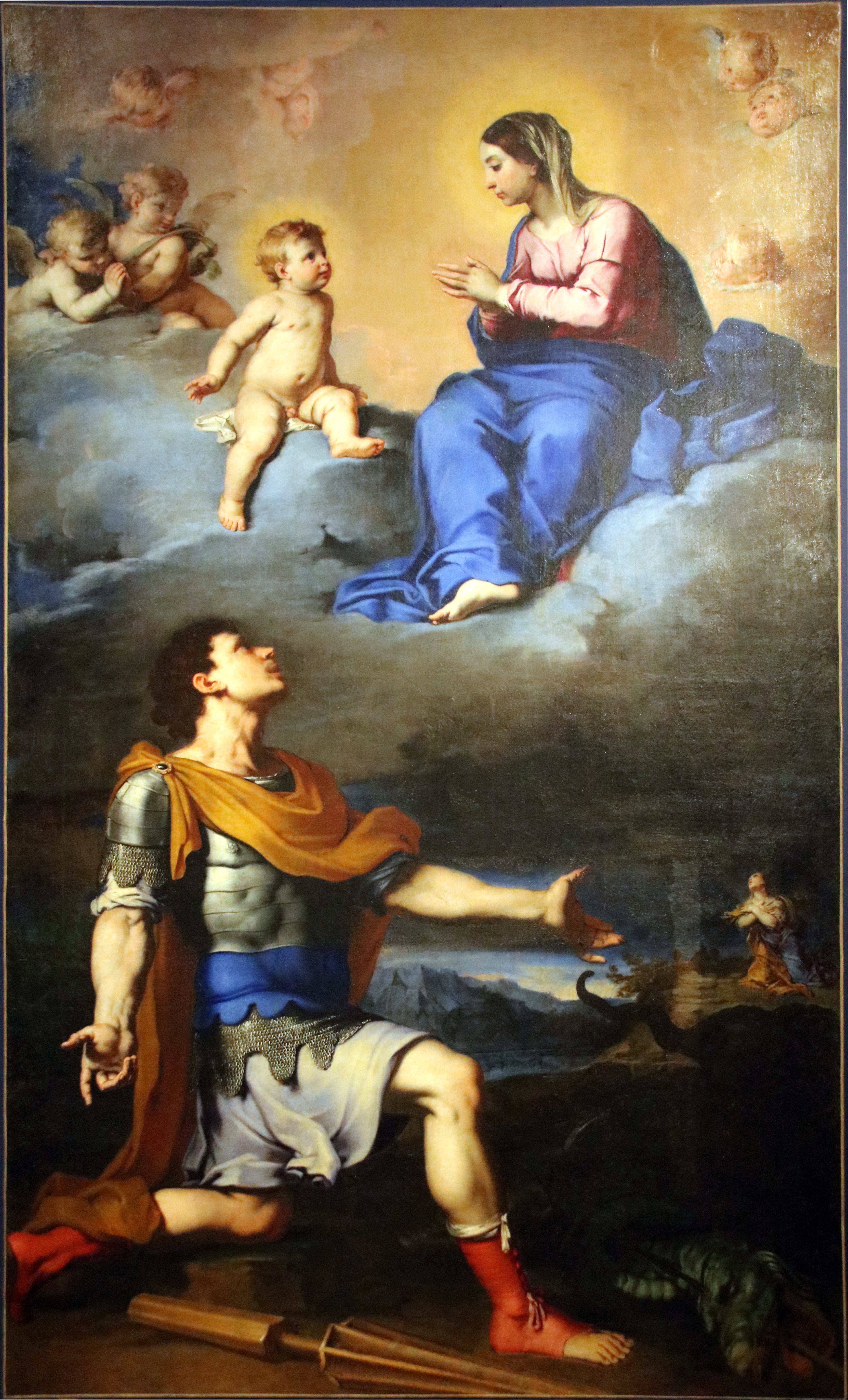 Jean Boulanger, Madonna della Ghiara con San Giorgio, 1652 circa, Pergola, Concattedrale di Sant'Andrea